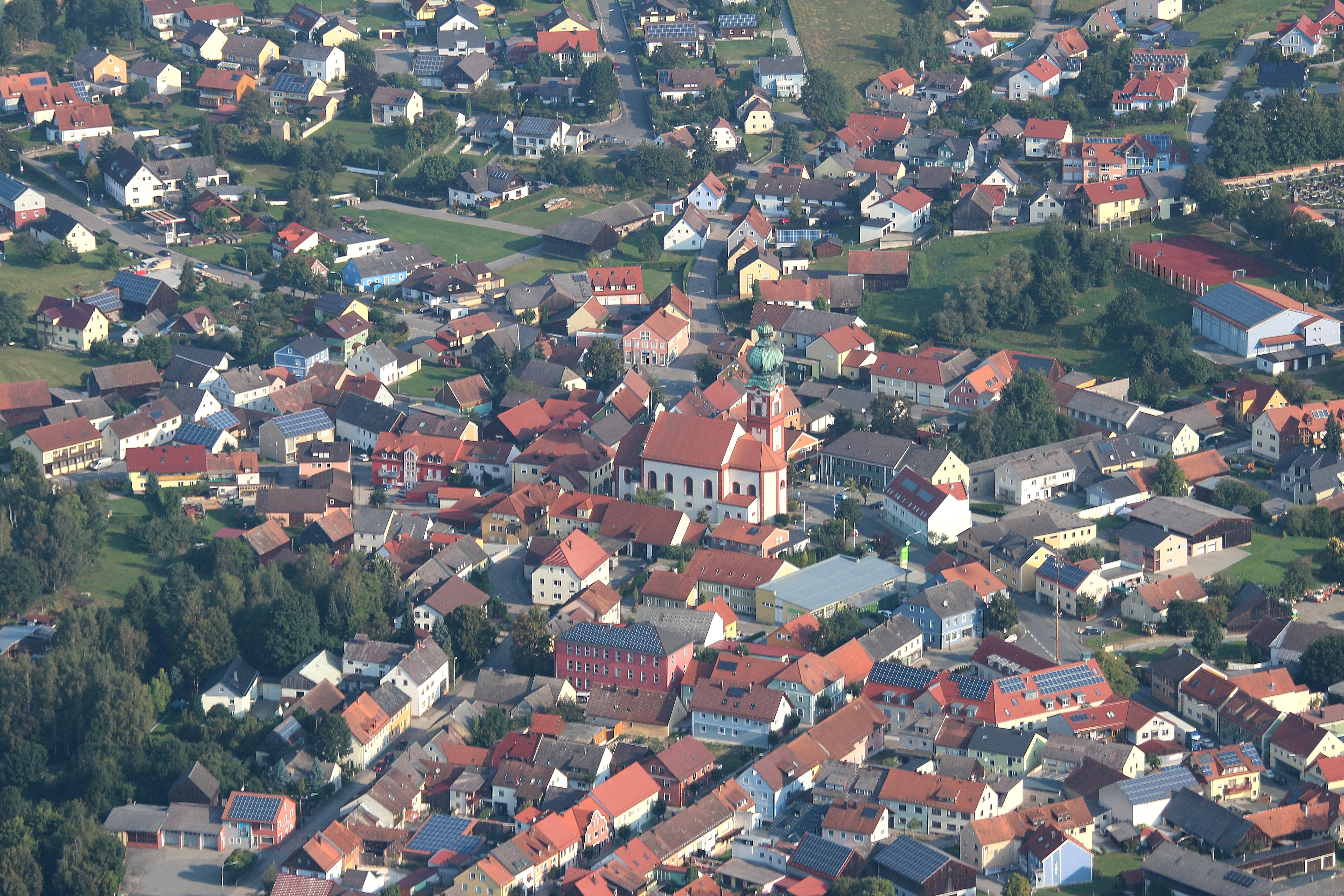 Eslarn, Marktplatz mit Rathaus, Pfarrkirche Mariä Himmelfahrt; Landkreis Neustadt an der Waldnaab, Oberpfalz, Bayern